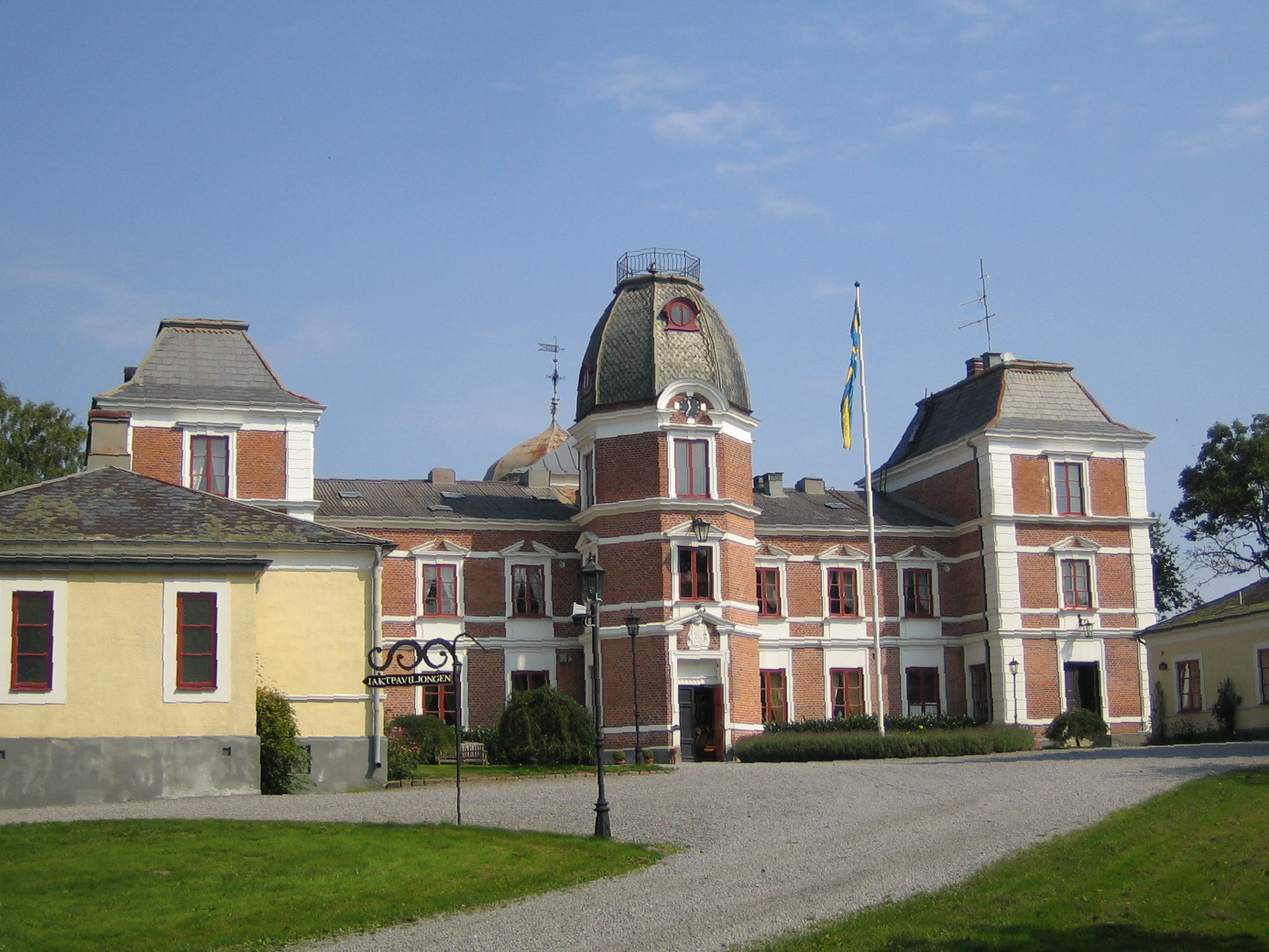 Snogeholms slott. Bilden tagen av mig själv 21 augusti 2005.